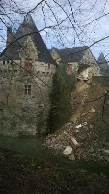 Vue des parties endommagées du château de Pontivy suite aux intempéries de février 2014